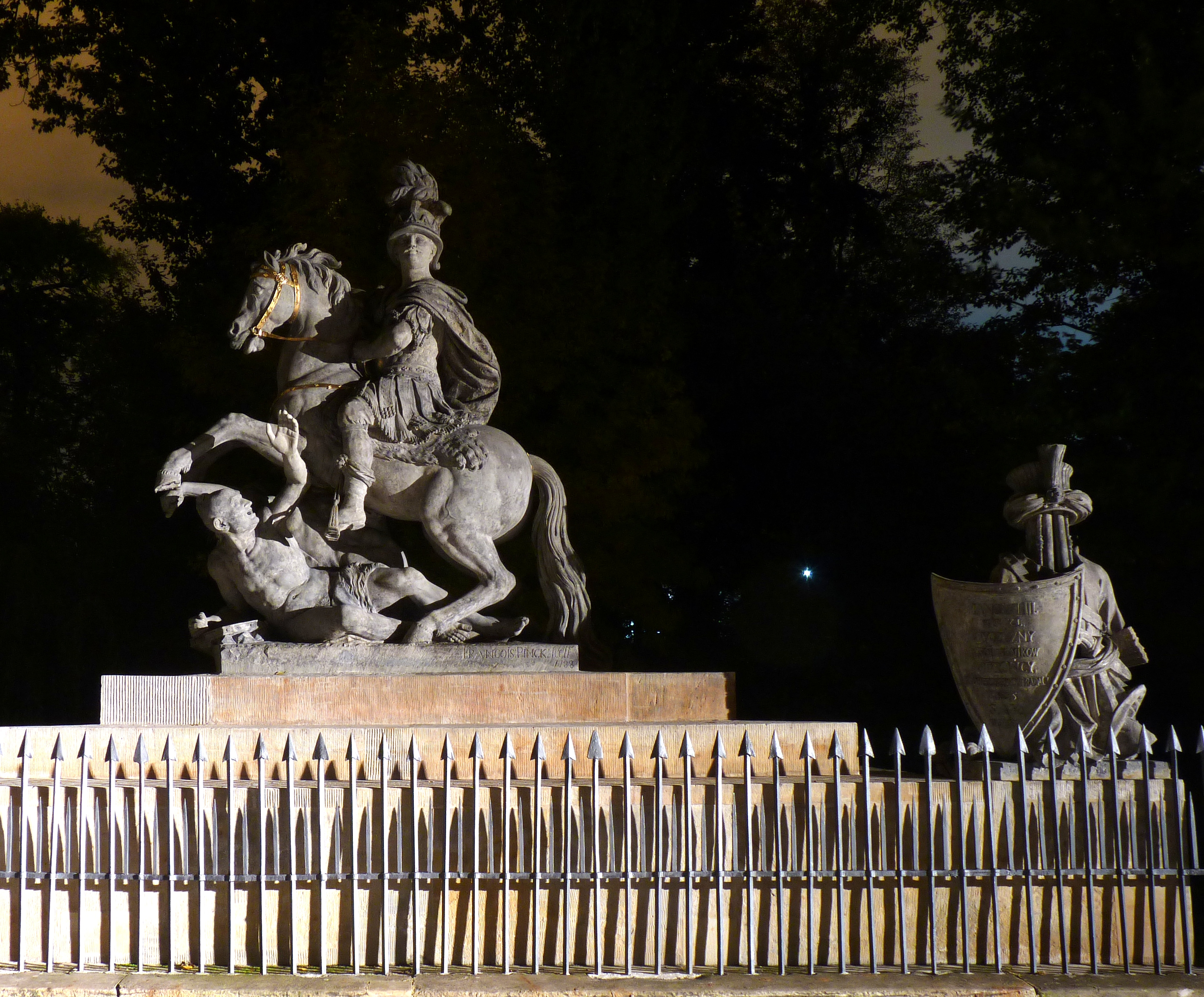 Warszawa, most z pomnikiem Jana III Sobieskiego